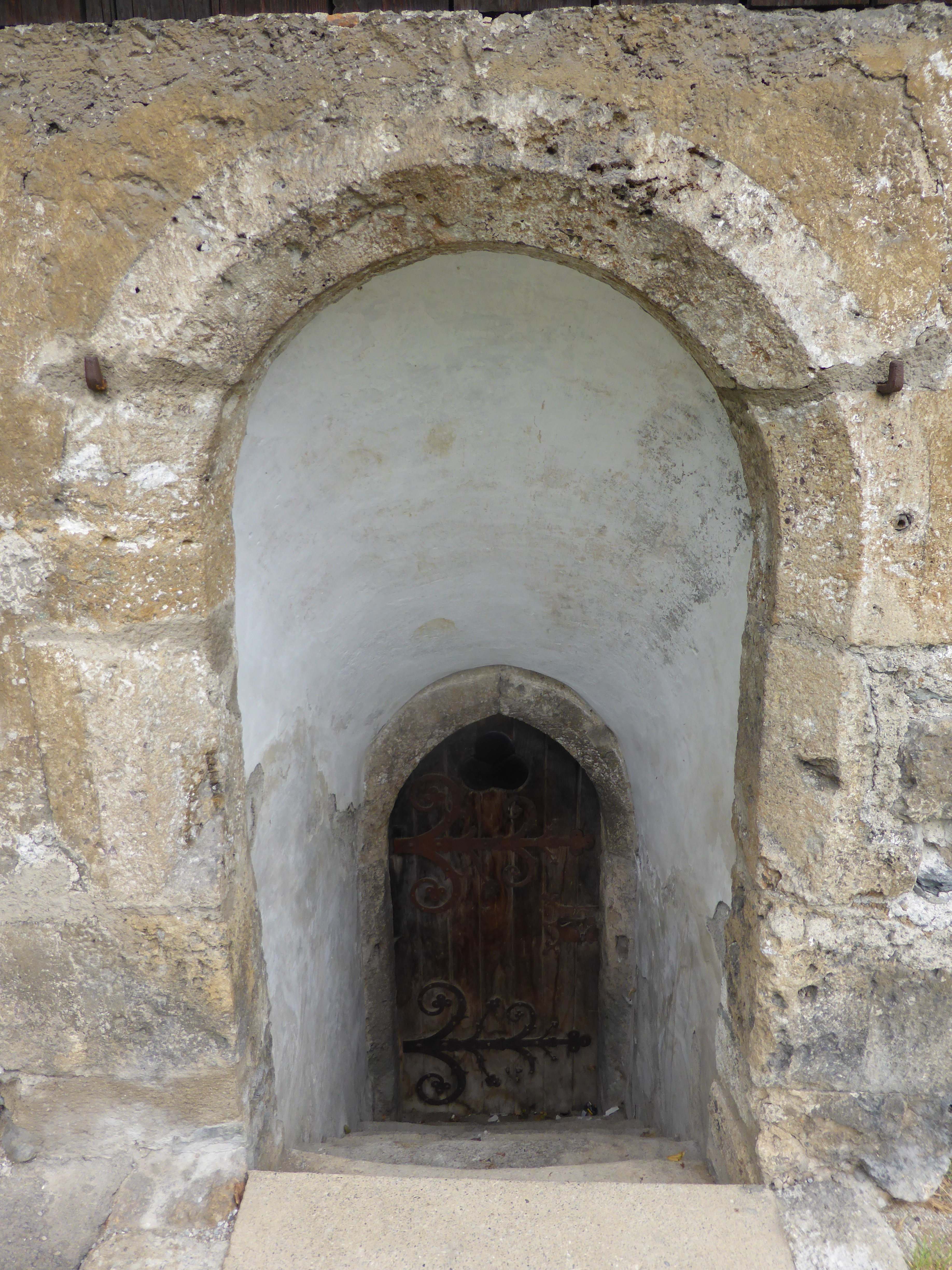 Kath. Filialkirche Unsere liebe Frau